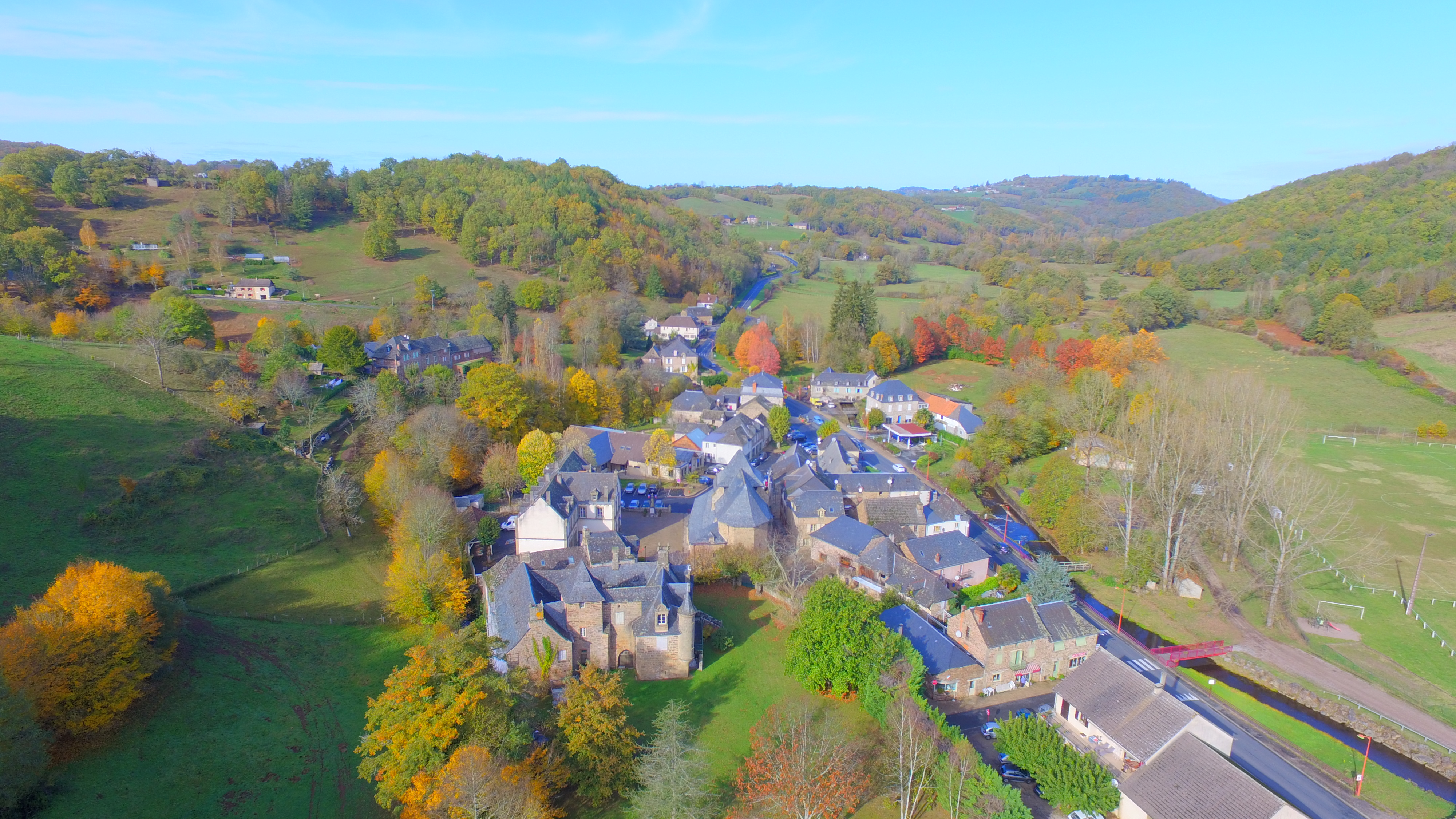 Vue aérienne de lanteuil